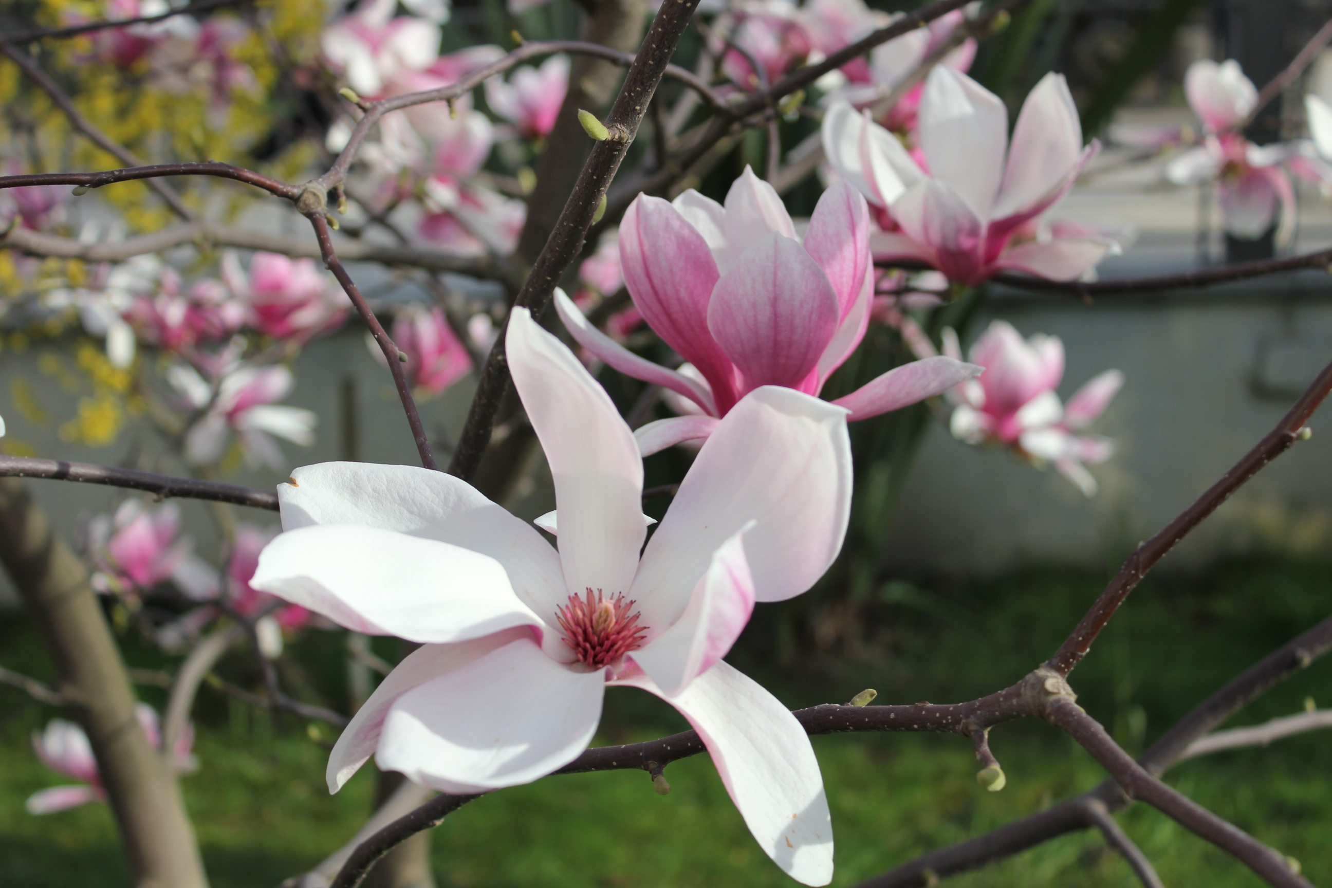 Магнолия Суланжа, Сочи, 14 марта 2013 (теплая зима)